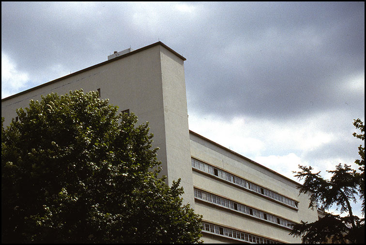 Willem Marinus Dudok: Collège Néerlandais (1926-1938), Fondation Juliana, Cité internationale universitaire, XIVe arrondissement, Paris. [1]